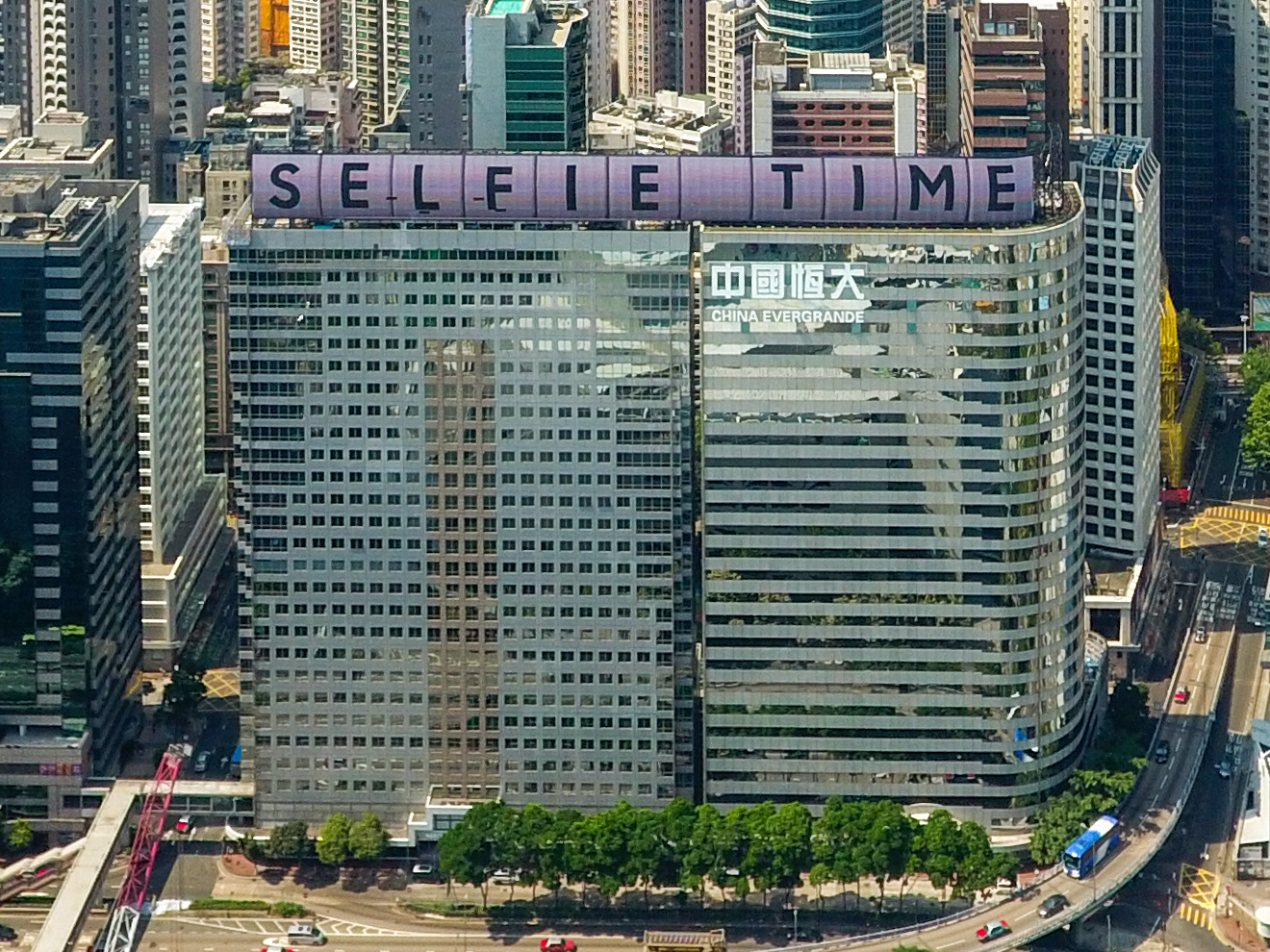 Harcourt House & China Evergrande Centre